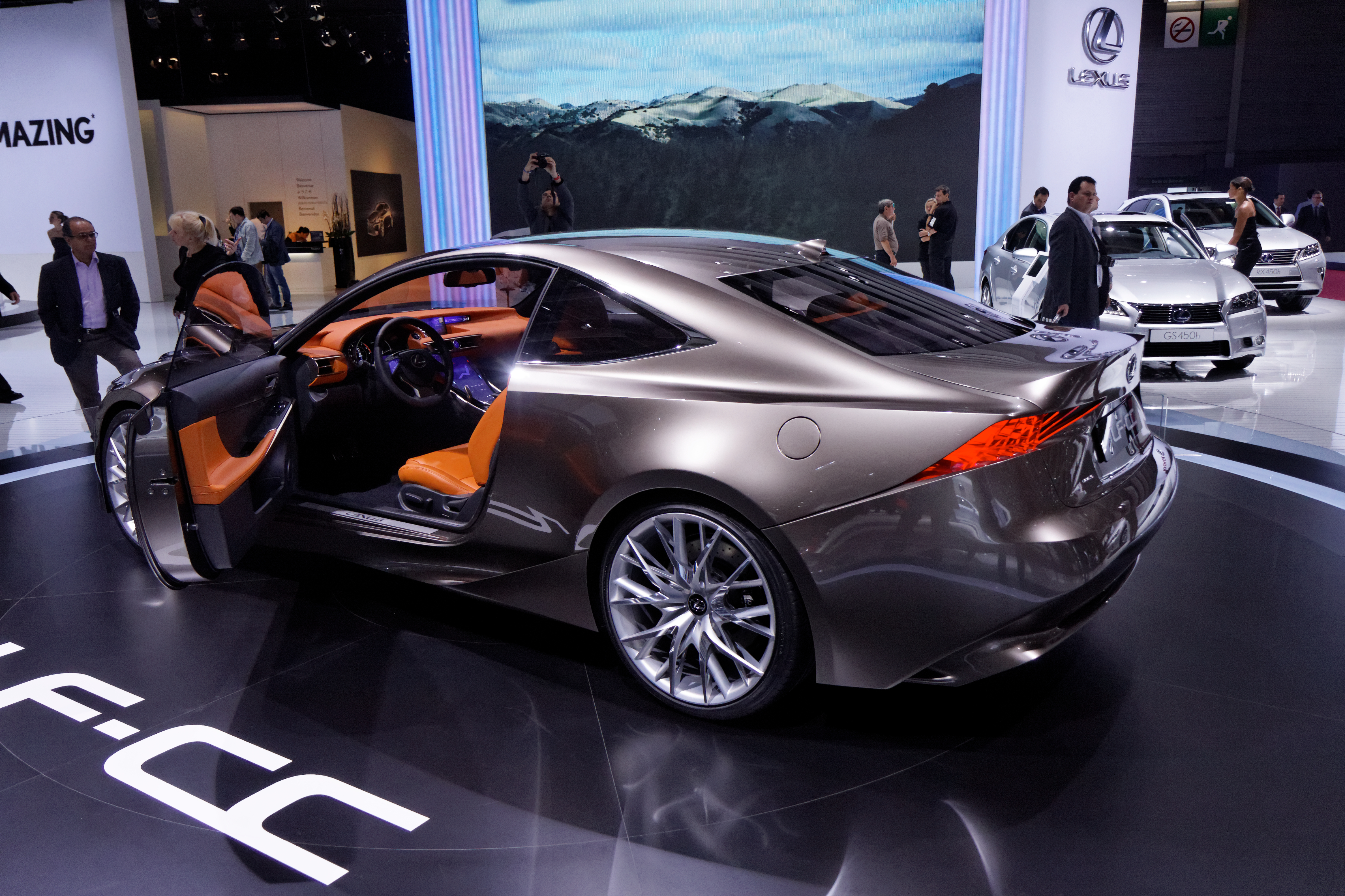 Une Lexus LF-CC présentée lors du Mondial de l'automobile de Paris 2012.